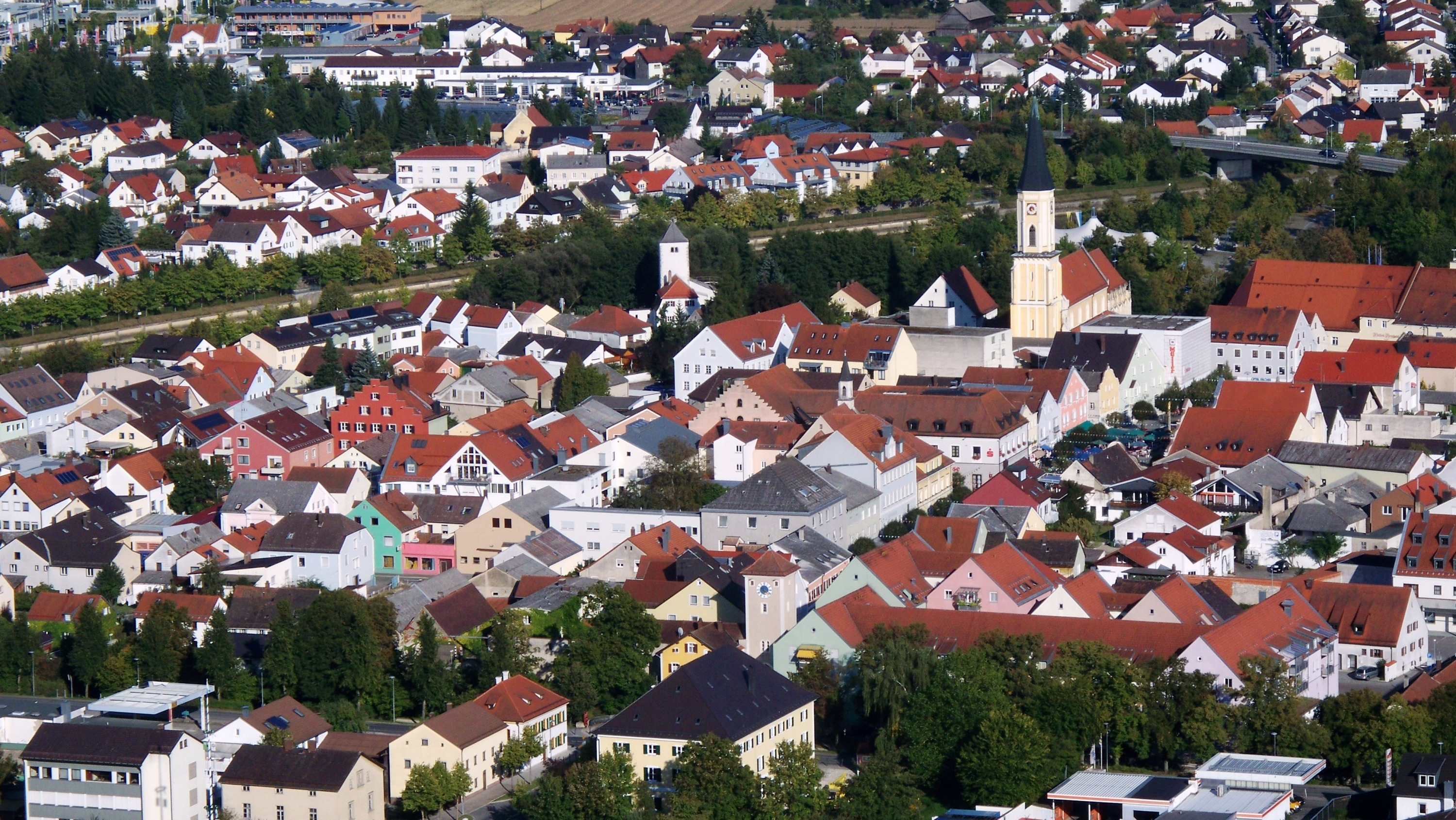 Die Altstadt von Kelheim